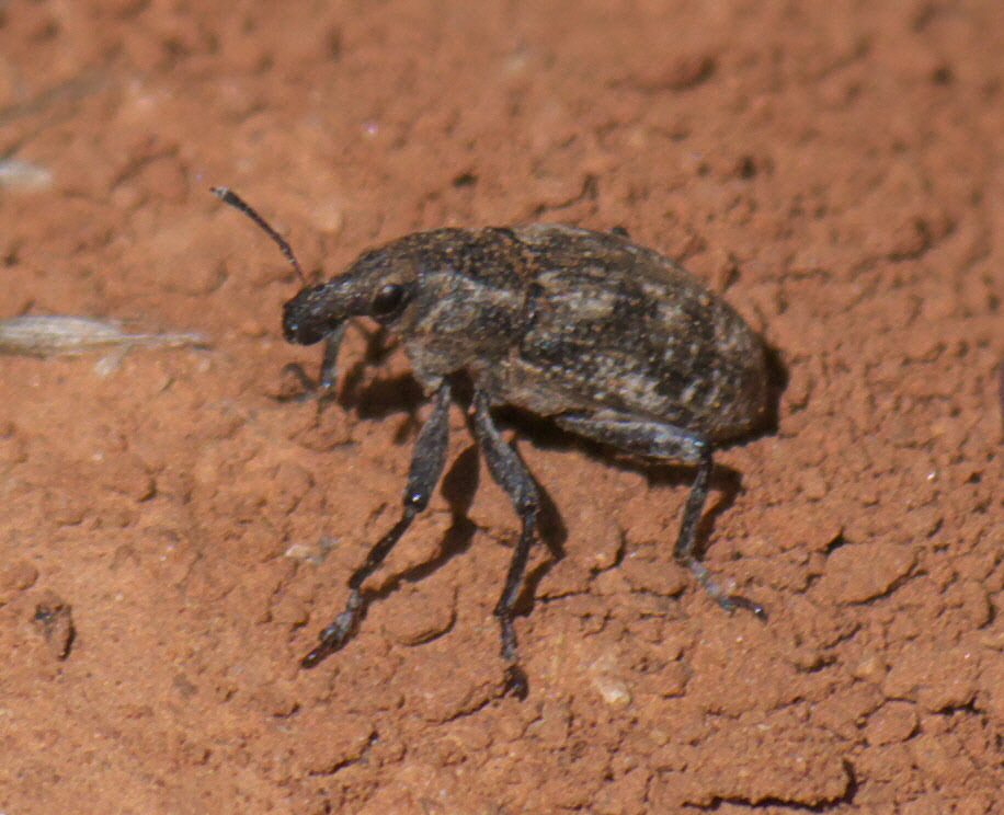 Apleurus lutulentus, Tribe: Cylindrical Weevils, ID Confidence: 95